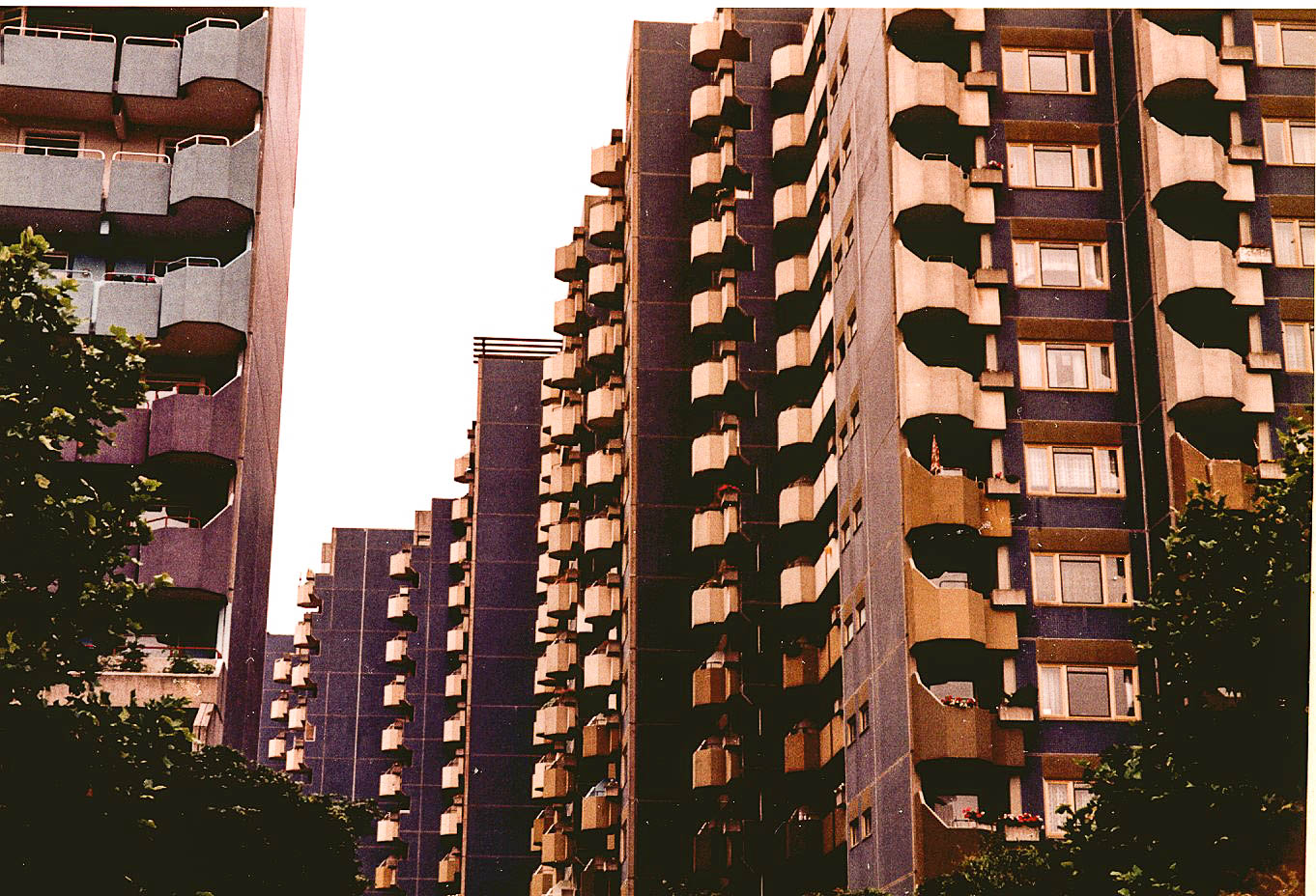 Lenzsiedlung, vom Eidelstedter Weg aus gesehen (1984)